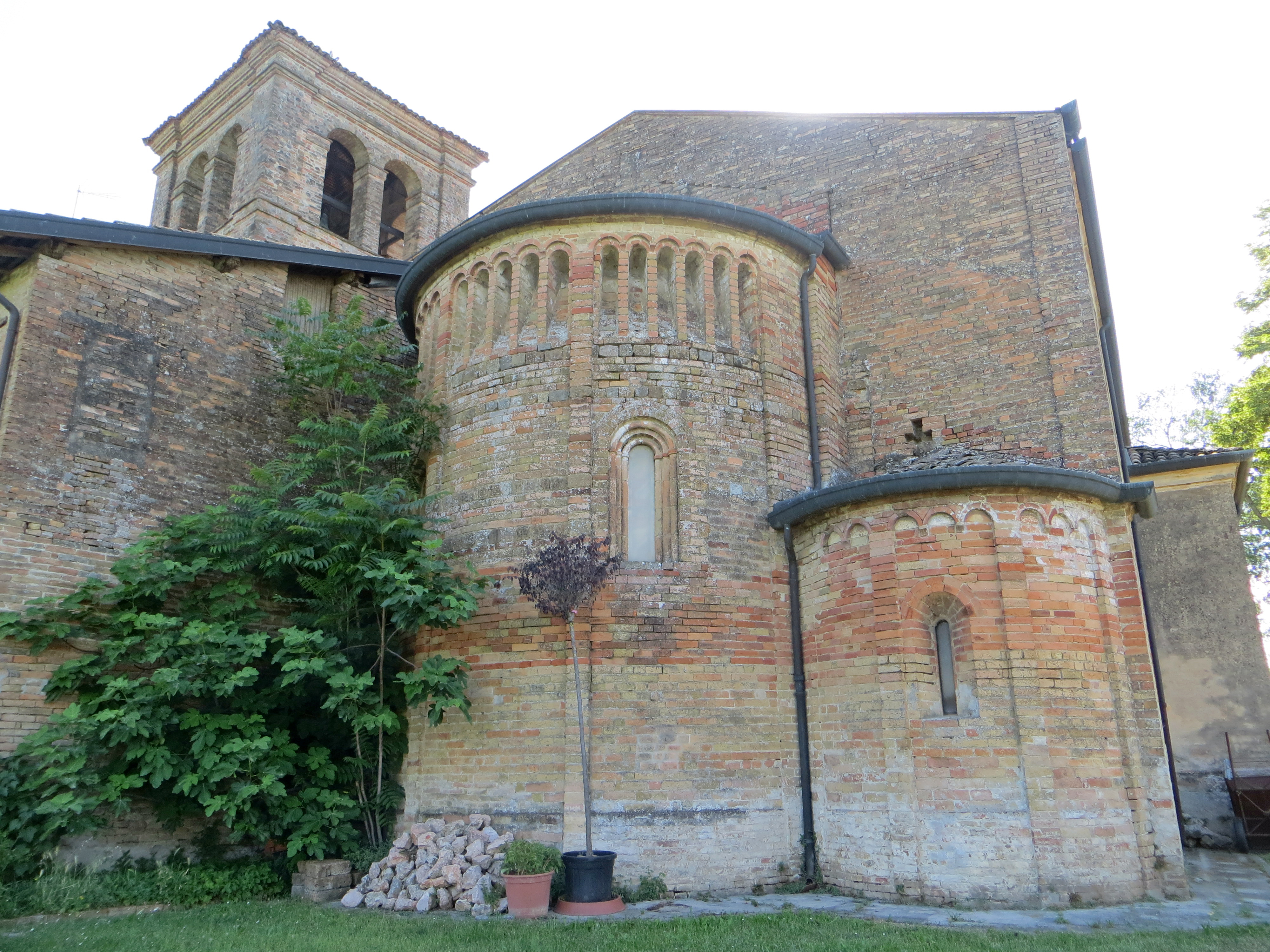 Pieve di San Giovanni Battista (Gainago, Torrile) - absidi